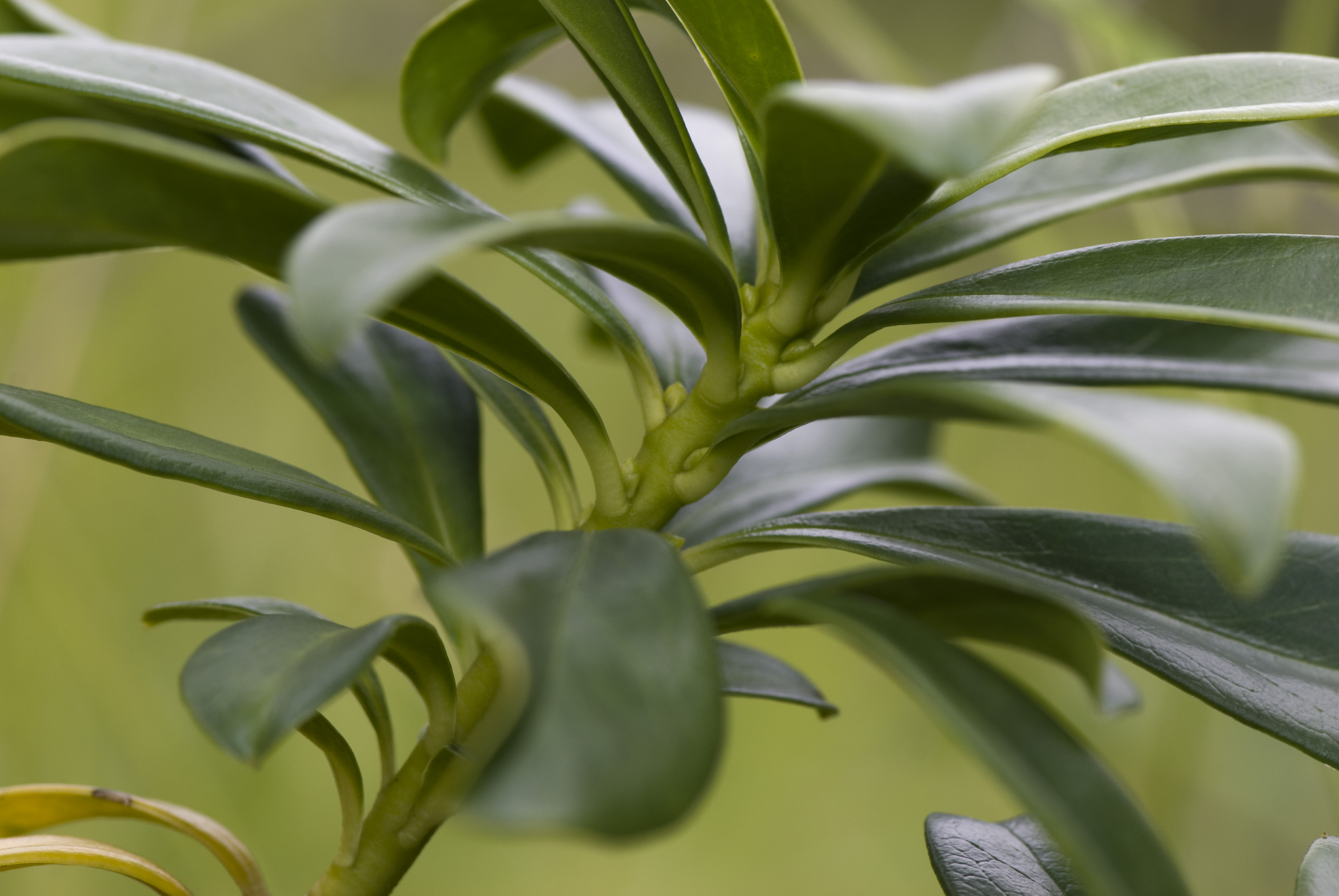 Daphne laureola Coteau de Chartèves (Aisne), France